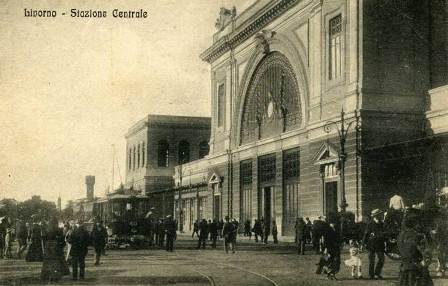 Livorno - Stazione Centrale con tram